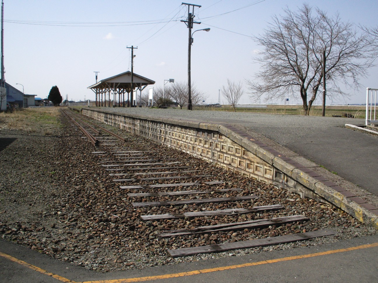 Karikawa Station, Shōnai, Yamagata, Japan